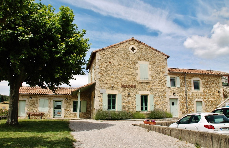 La Mairie